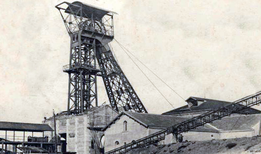 Puits Gilier, 42, Fr